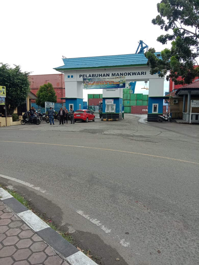 Gerbang pelabuhan manokwari